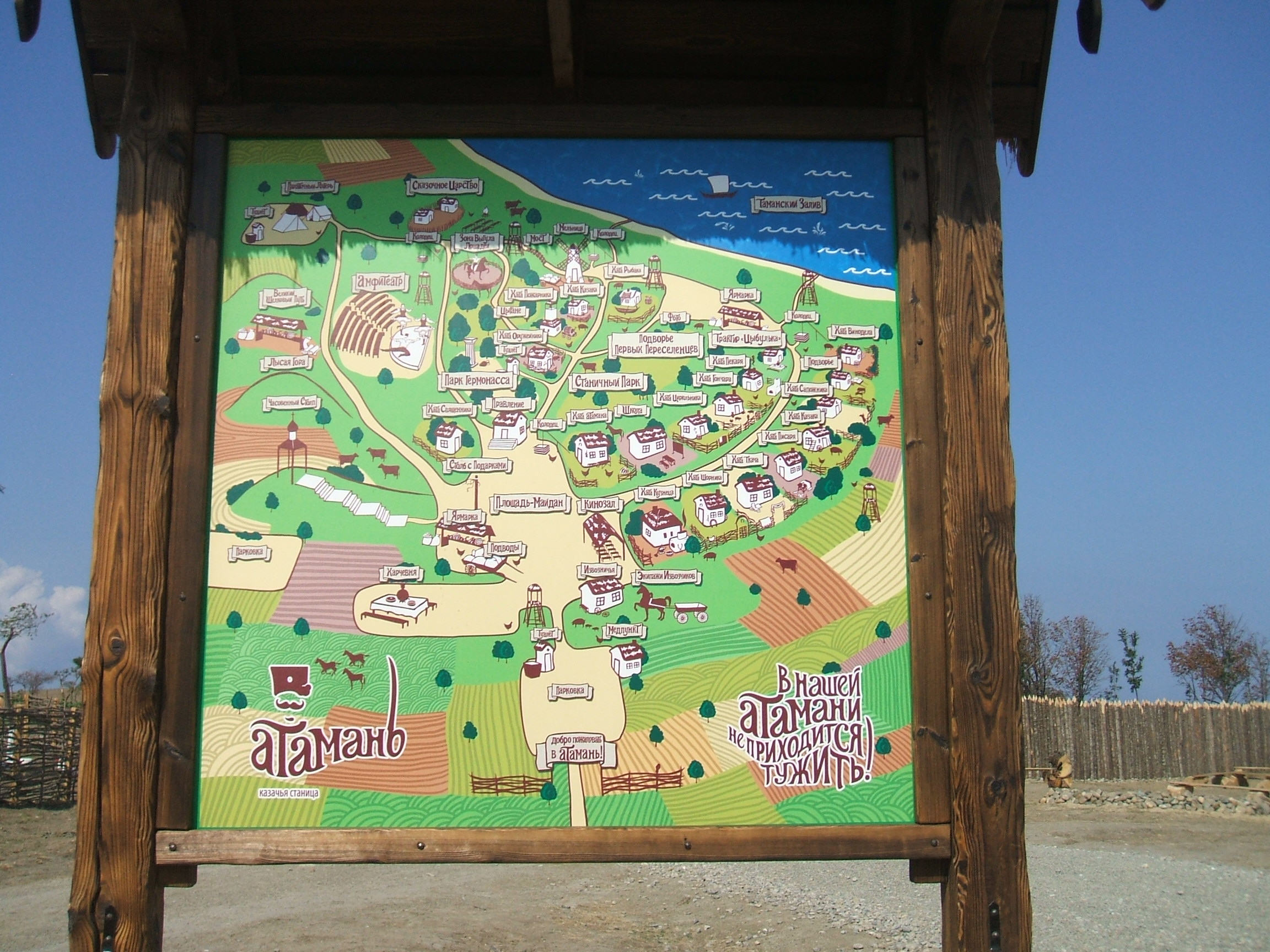 музей Атамань